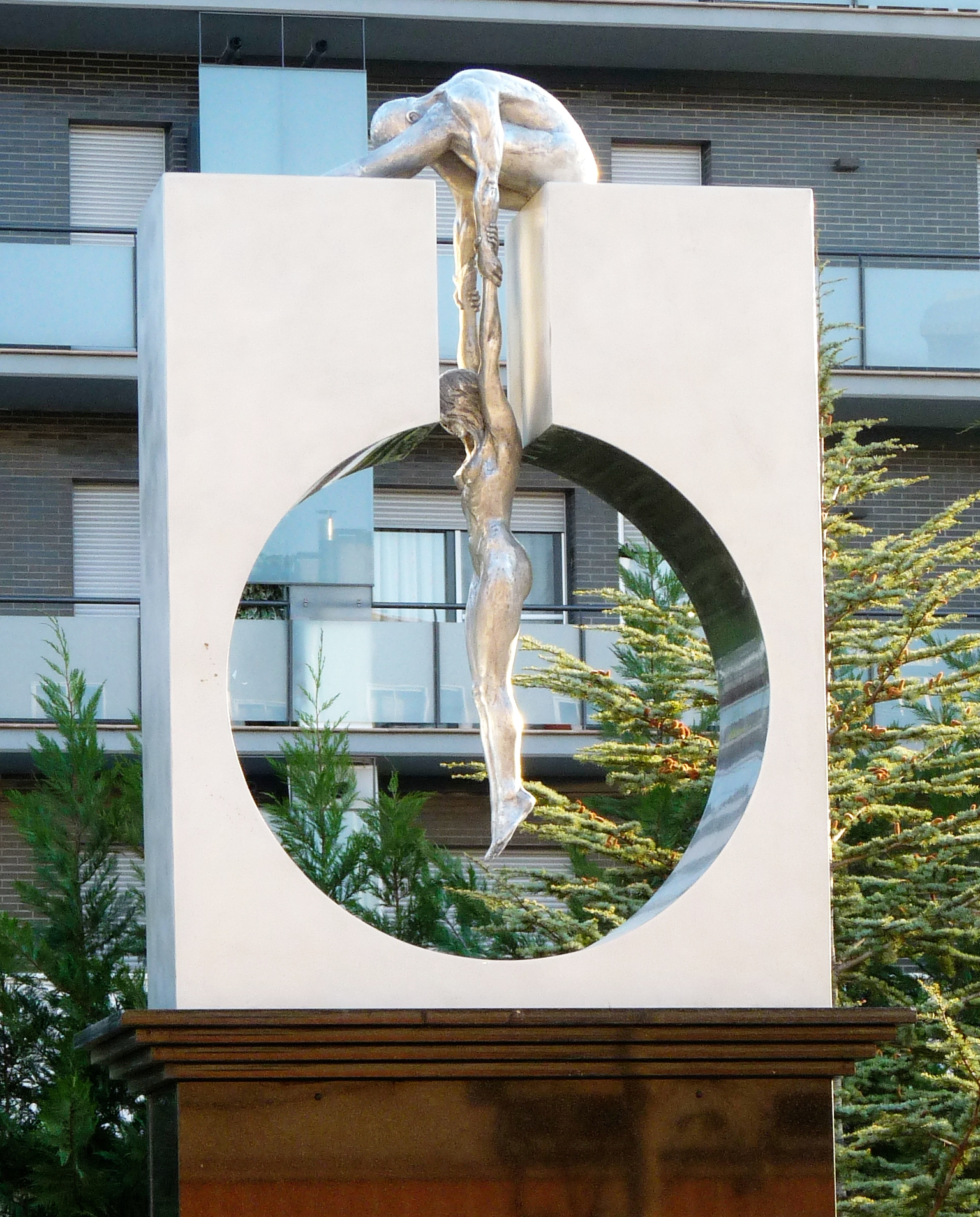 "Gravedad" (2010) - Lorenzo Quinn. Situada en la Avda. de Aragón en Fraga (Huesca)